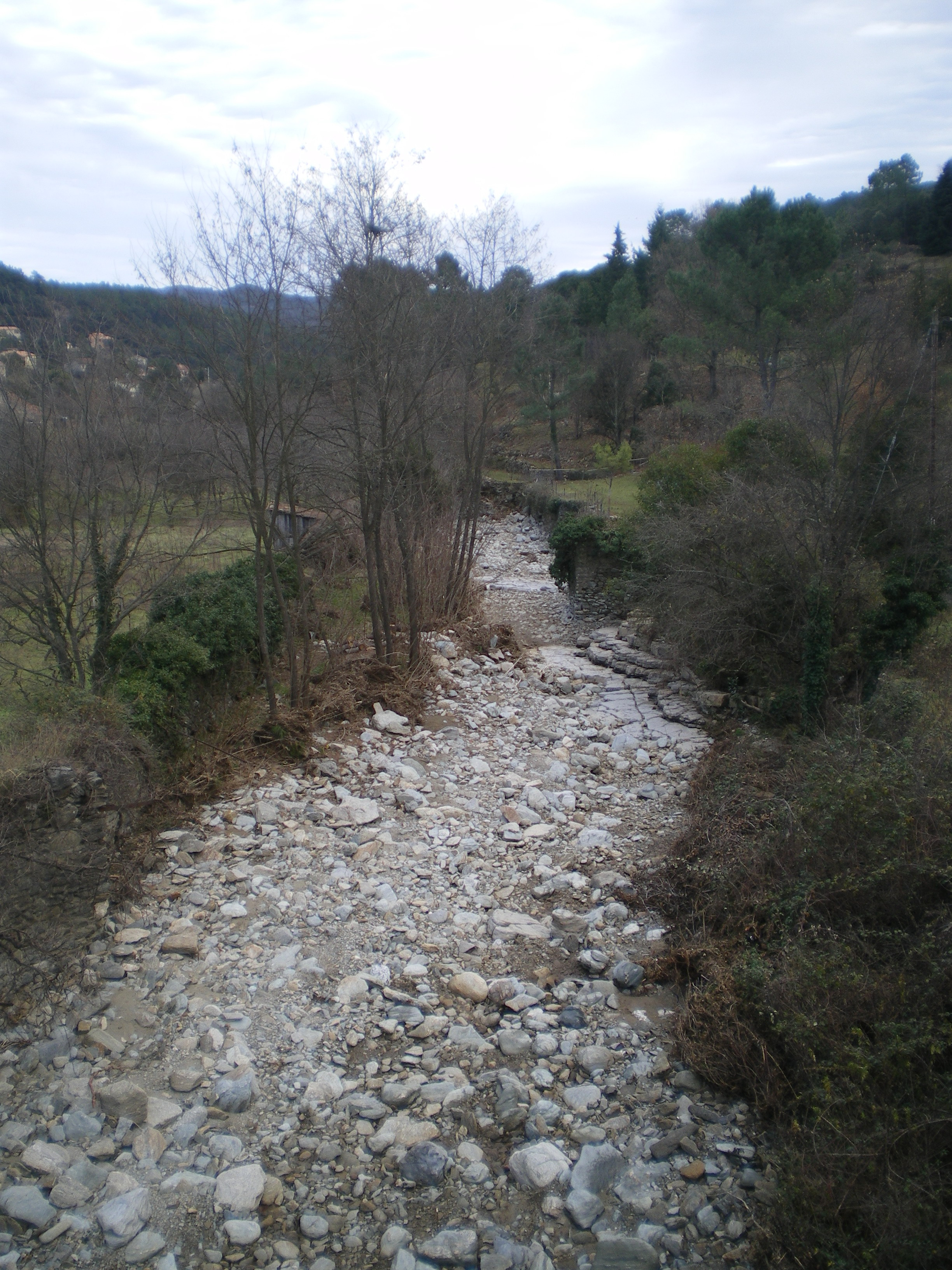 Rivière le Brêmo, Branoux, France